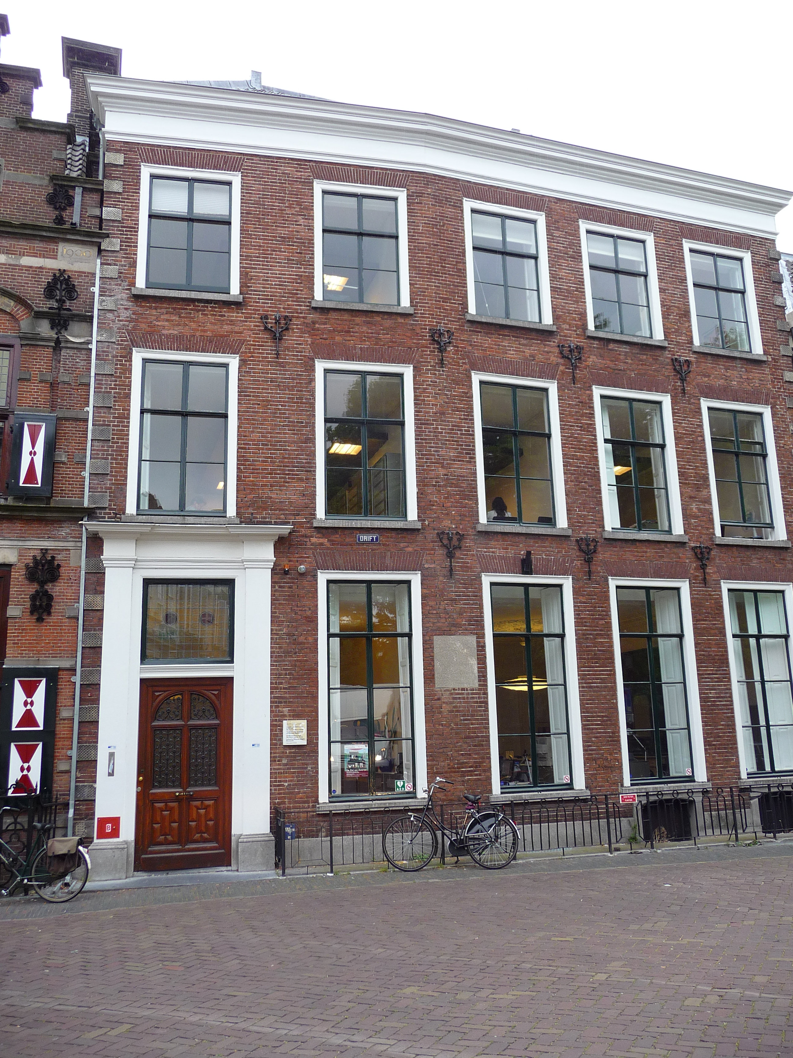 Rijksmonument aan Drift in Utrecht